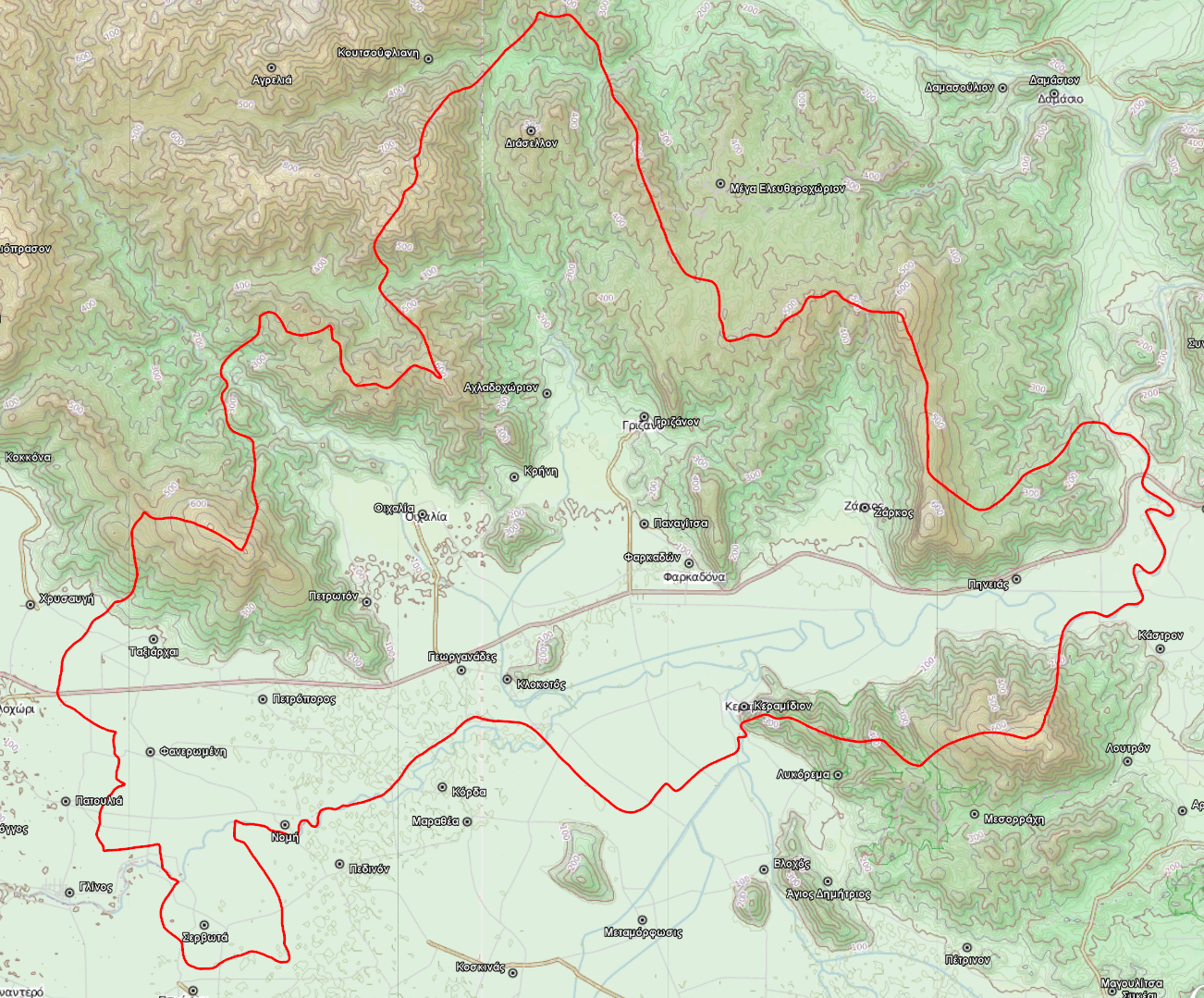 Τοπογραφικός χάρτης του Δήμου